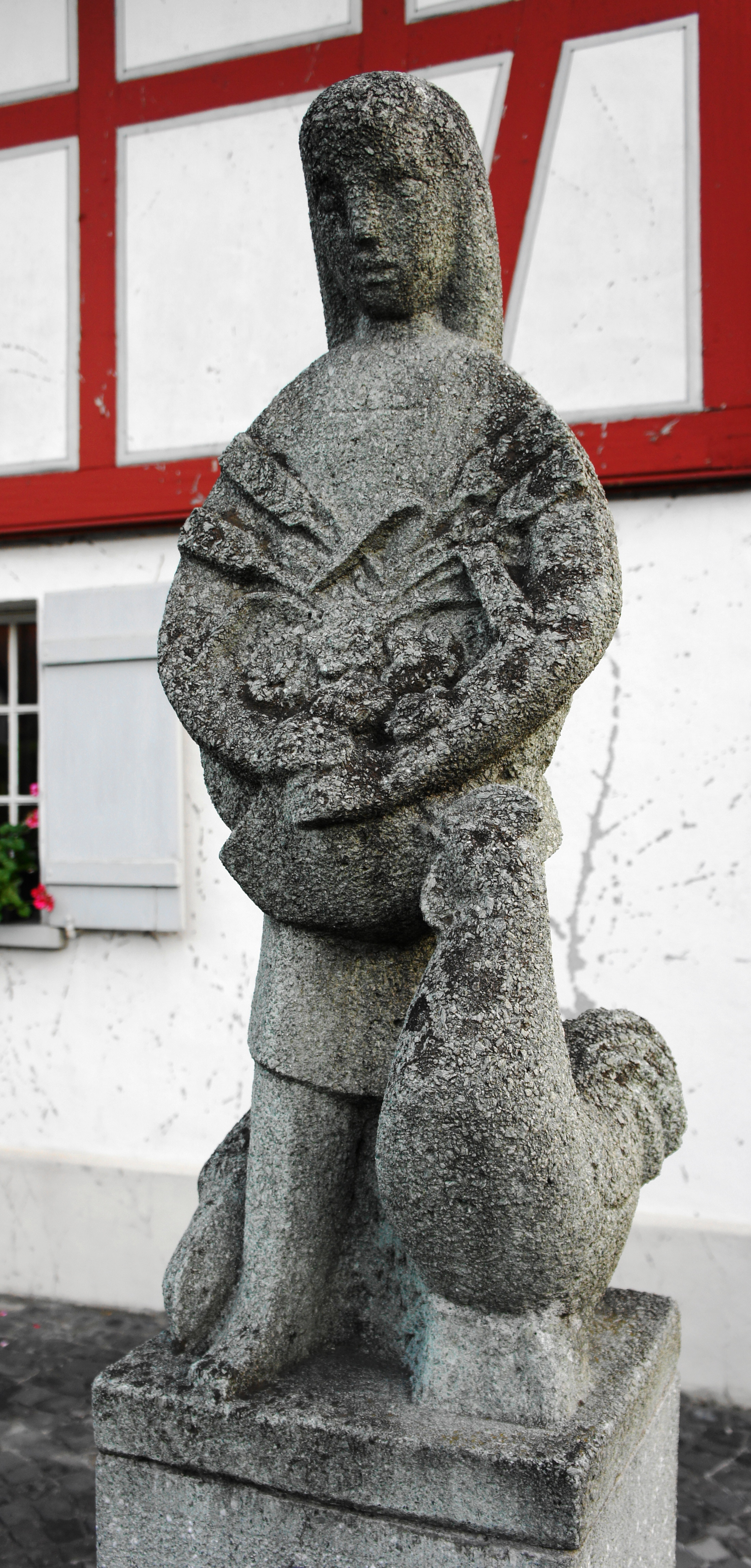 Die steinerne Skulptur auf dem Brunnensockel des Untermäderbrunnens (gem. Informations-Schild am Brunnen) oder Rubin-Brunnen (gem. Inventar der Gemeinde) in Balgach; Motiv "Mädchen mit Feldblume" gestaltet vom Künstler Meinrad Zünd (Mädy Zünd). Sie zeigt ein stehendes Mädchen mit langem Haar. Neben ihrem linken Fuss steht ein Hahn und in beiden Händen hält sie auf Schosshöhe ein paar Blumen und Ären.